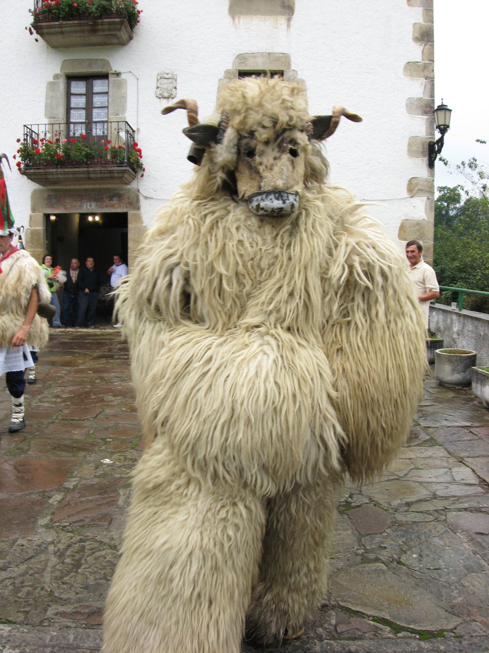 L'ours des ioaldunak (artza) Pyrénées).